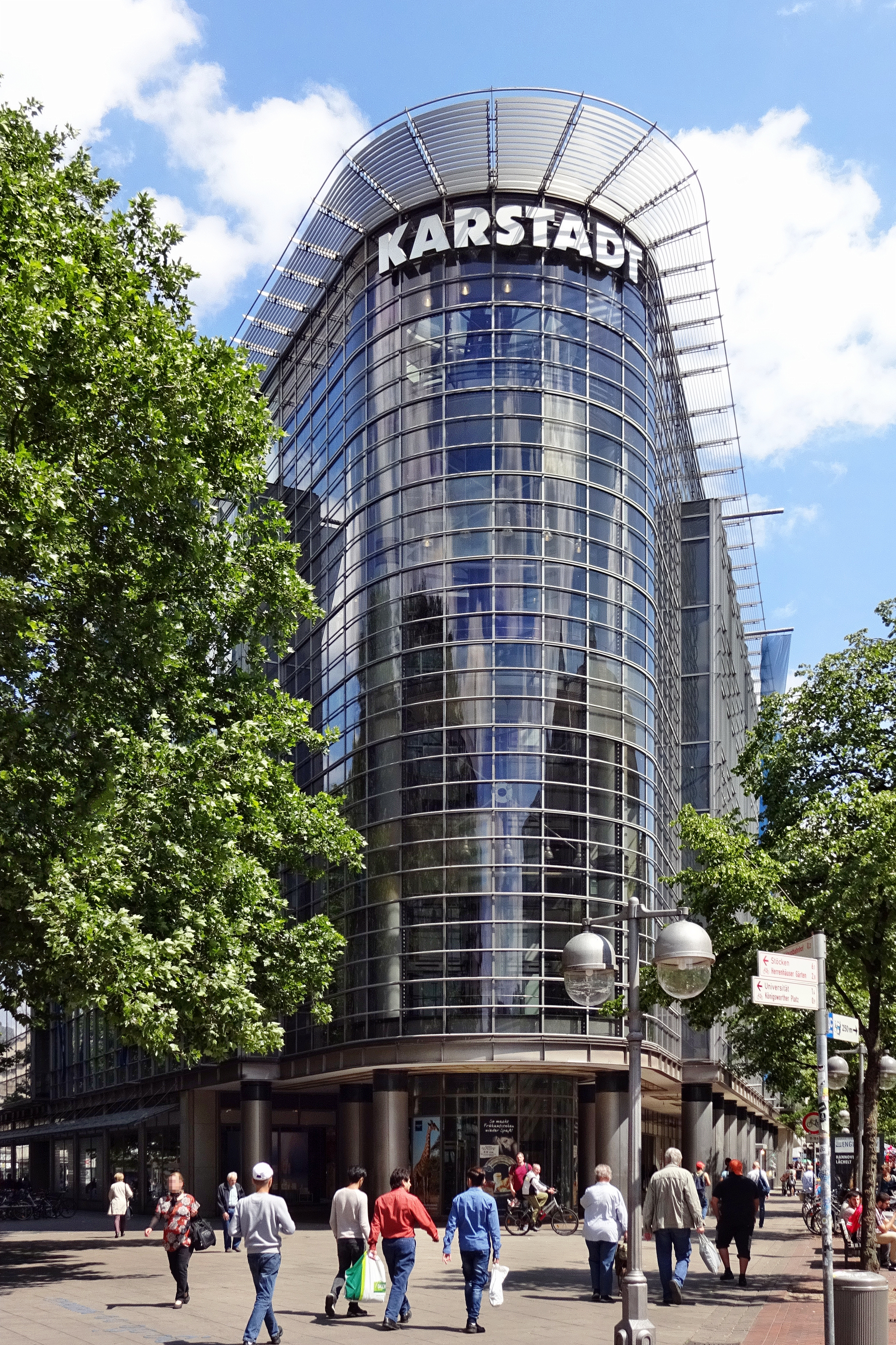 Karstadt (Haupthaus) in Hannover